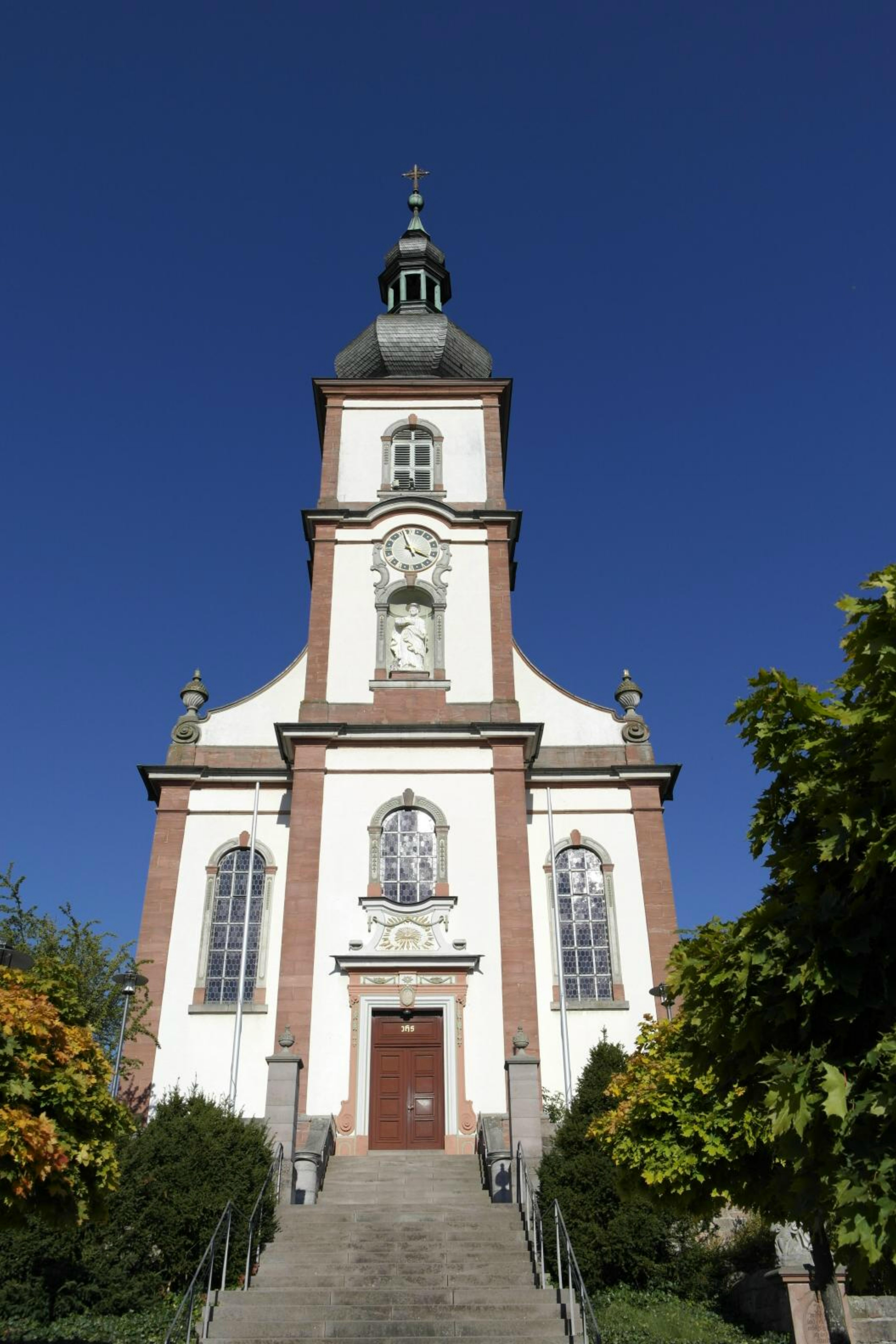 Hilders, Kirche St. Bartholomäus